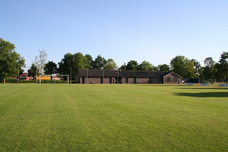 Accommodatie gezien vanaf het hoofdveld